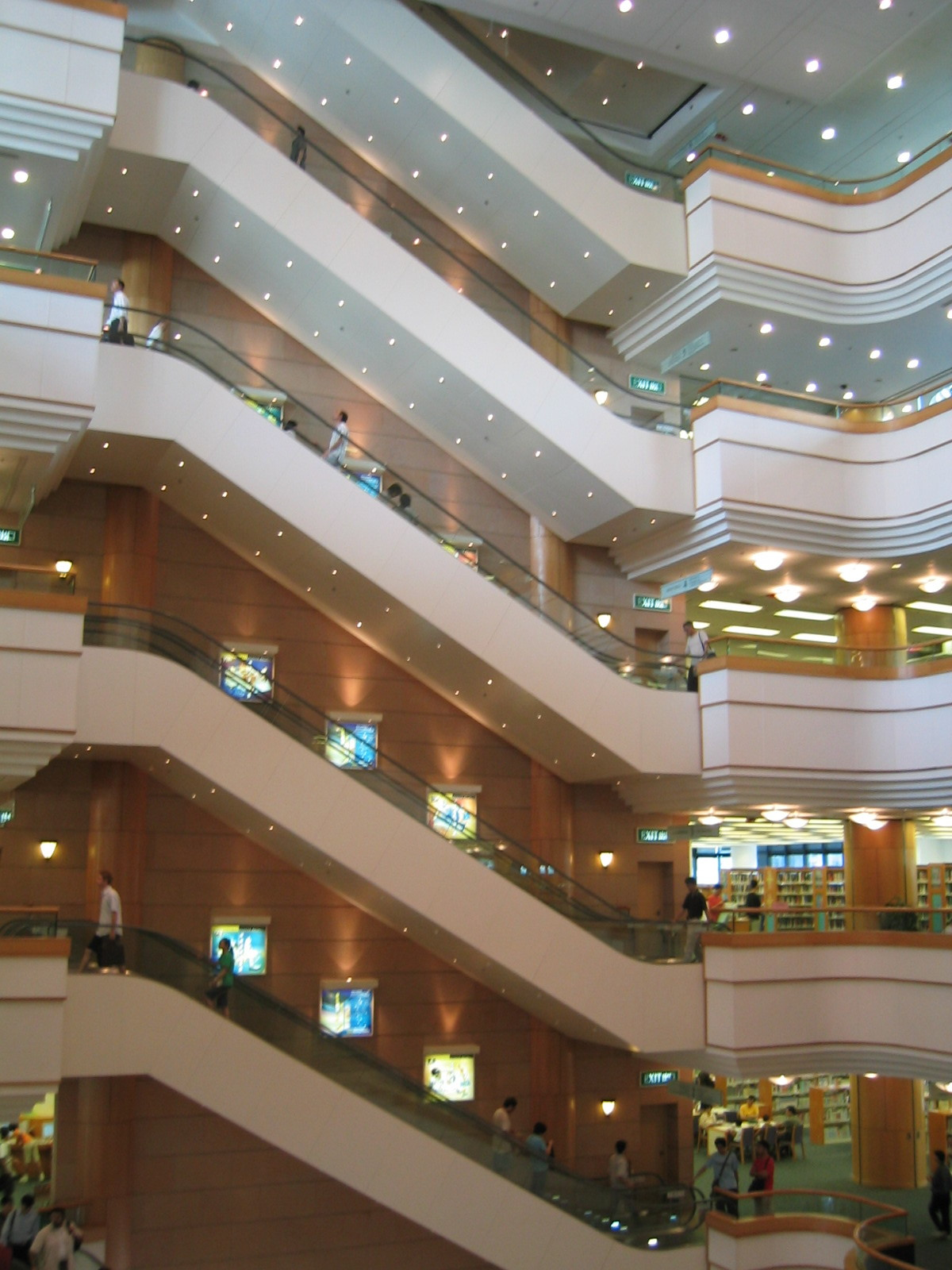 Hong Kong Central Library, Causeway Bay, Hong Kong